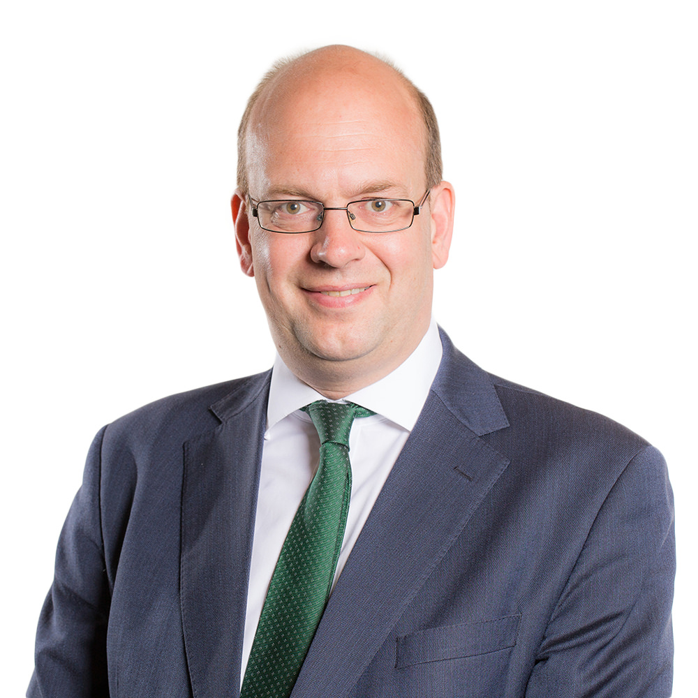 Plaid: Plaid Annibyniaeth y Deyrnas Unedig (UKIP) Rhanbarth: Dwyrain De Cymru Party: United Kingdom Independence Party (UKIP) Region: South Wales East